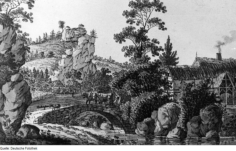 Original image description from the Deutsche Fotothek Triebischtal-Roitzschen. Neidmühle, um 1790 (Stadtarchiv Meißen)